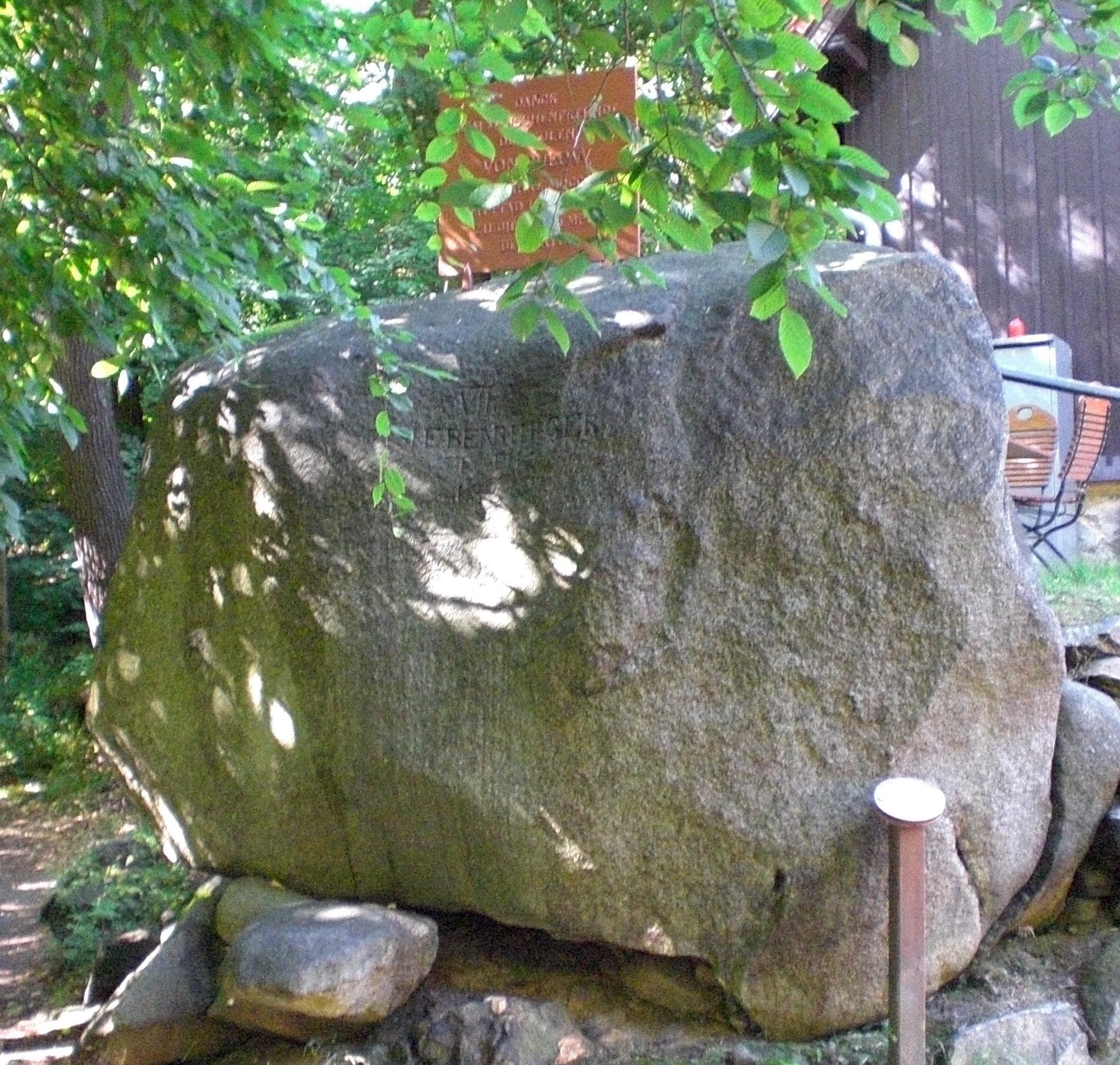 Stein mit Hinweis auf den Siebenbrüderfelsen bei Königsruhe im Bodetal, Harz